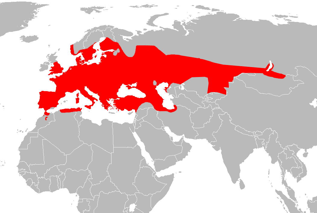 Cutted out of File:Mapa Natrix natrix.png